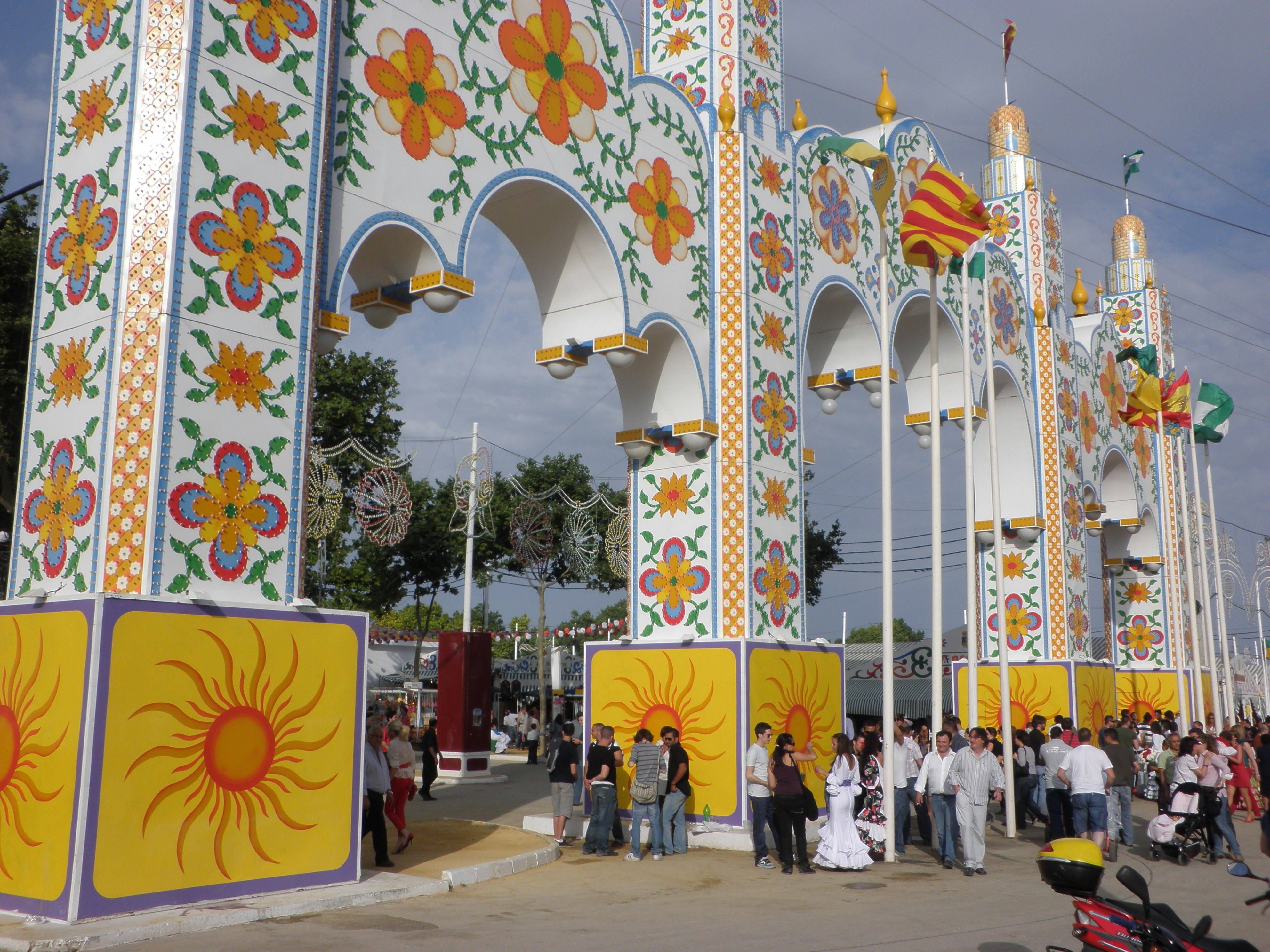 Portada, Feria de Primavera y Fiesta del Vino Fino (El Puerto de Santa María)